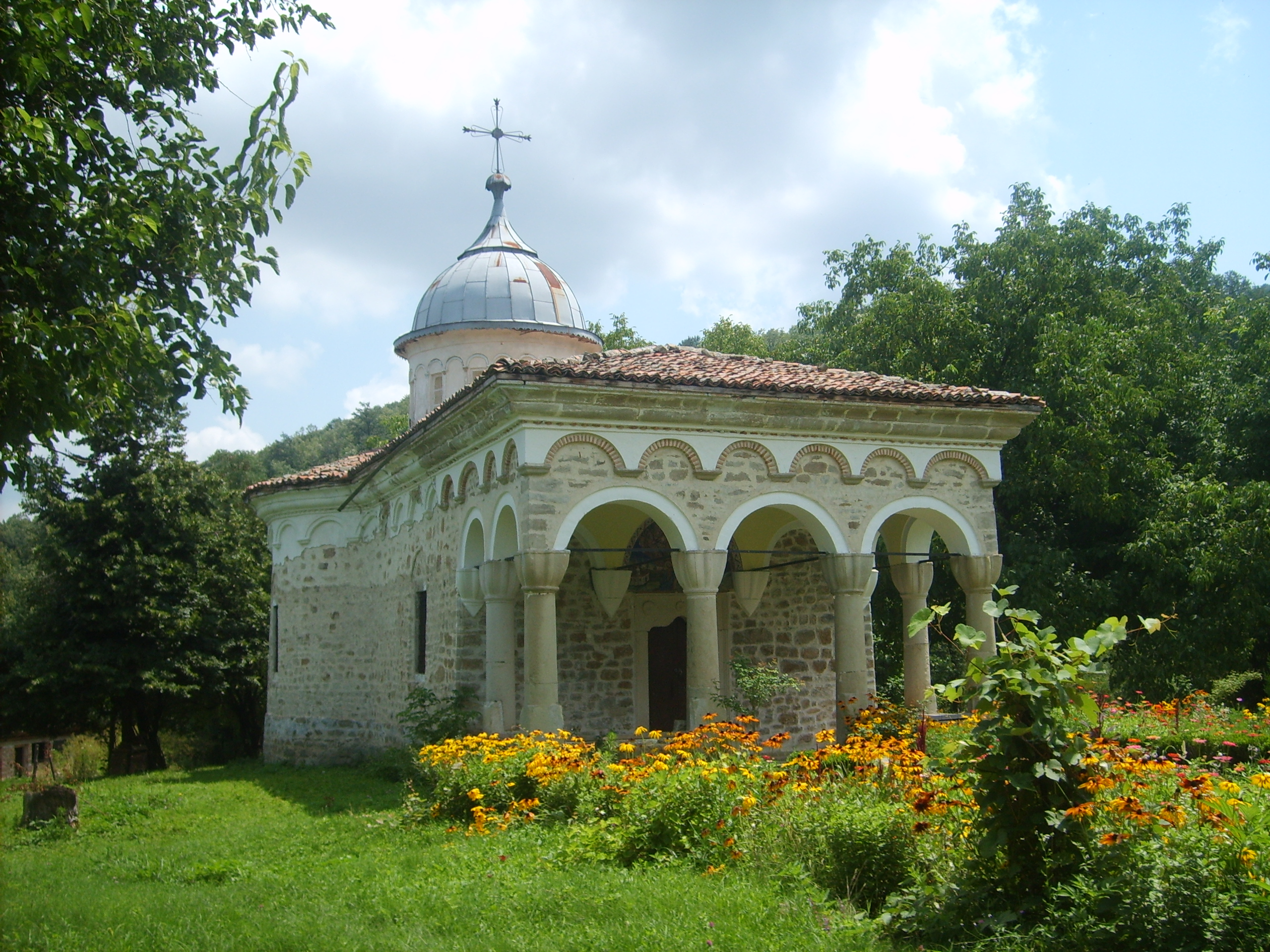 Плаковският манастир "Св.Илия"